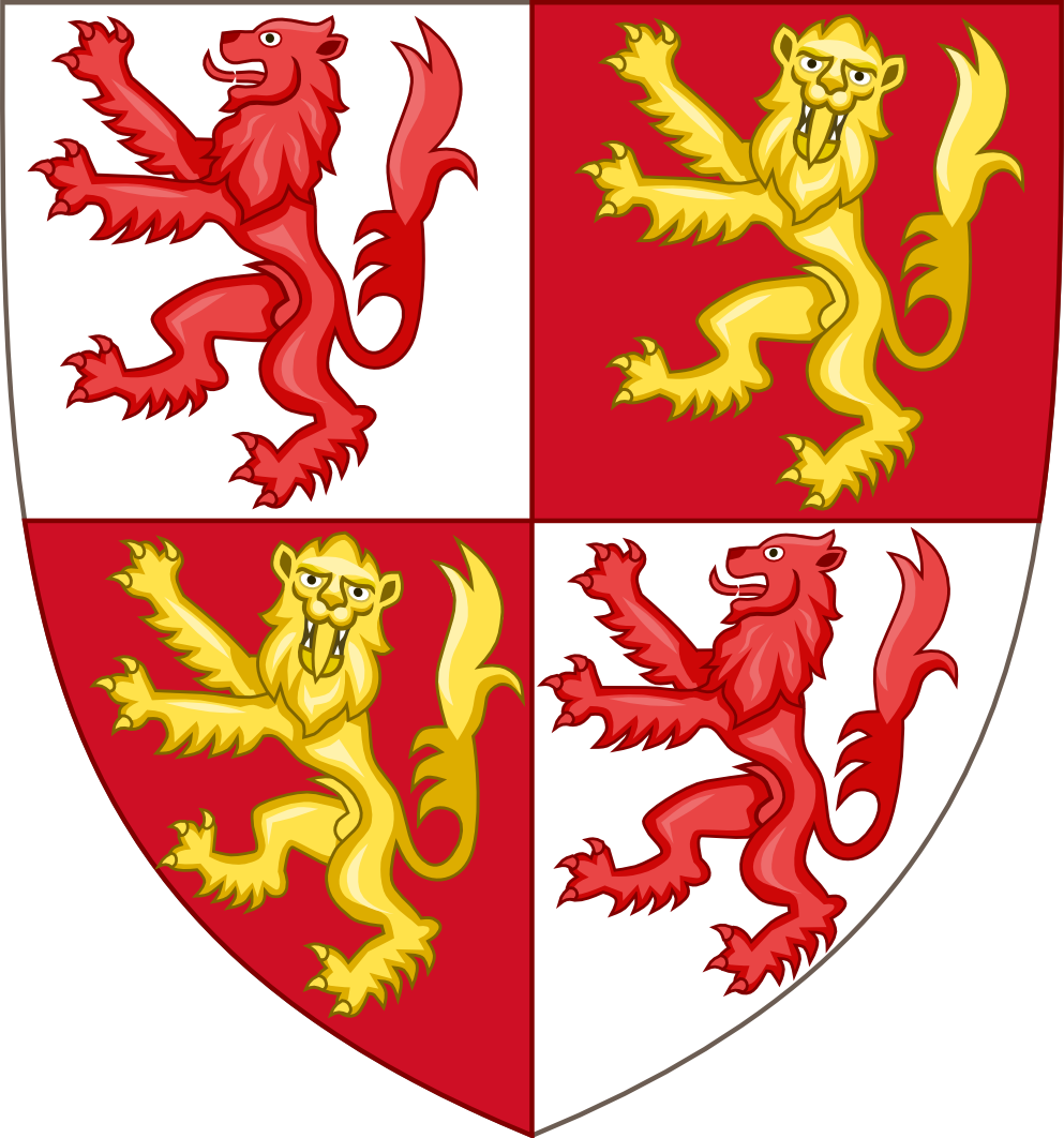 Armes des comte d'Armagnac et de Rodez